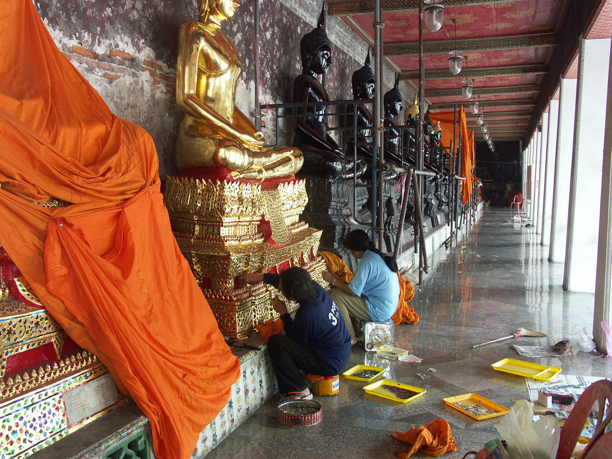 Wat Suthat, Bangkok, Thailand - พระระเบียง